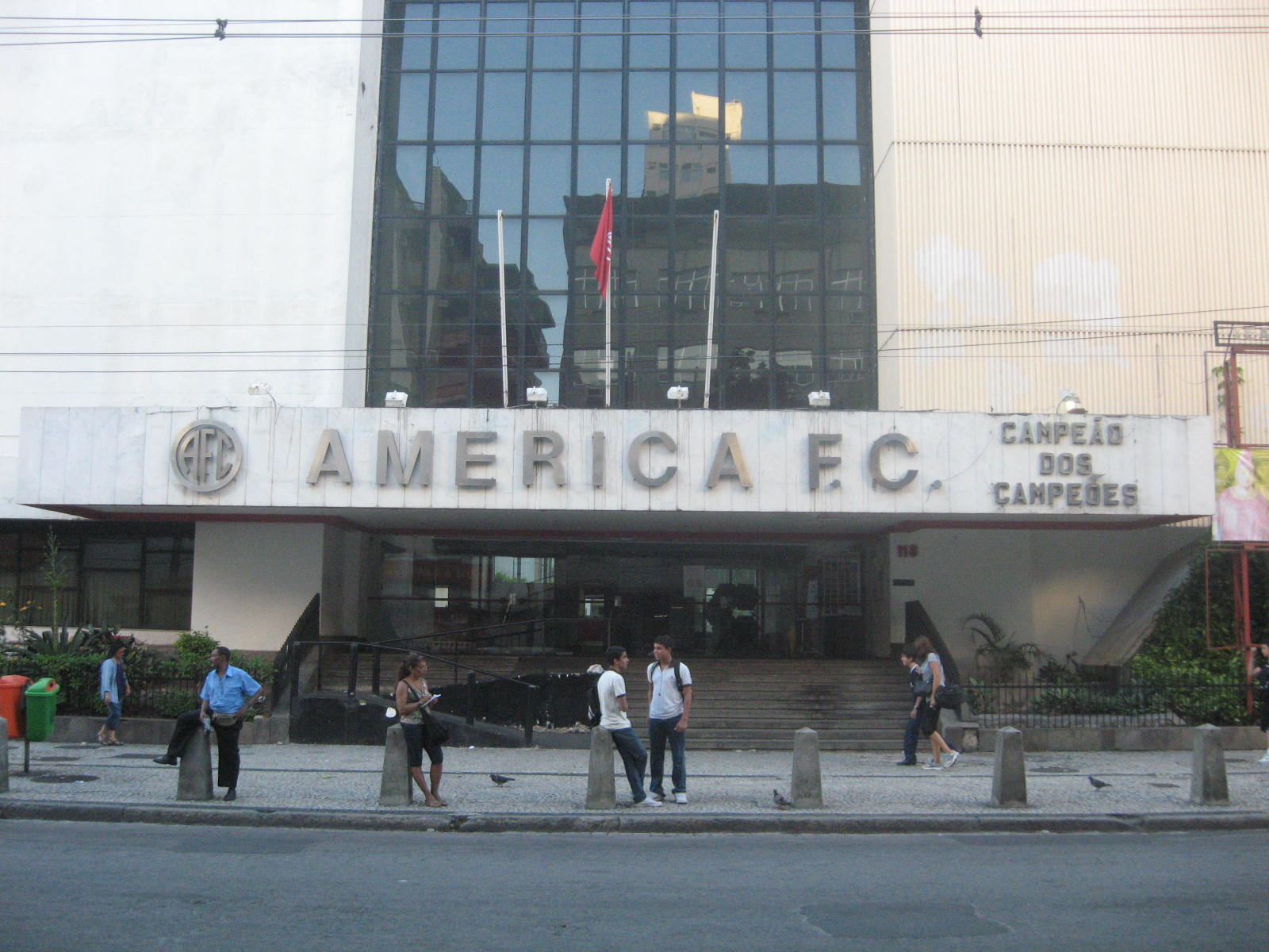 Sede social do América Football Club, na rua Campos Sales, Tijuca, Rio de Janeiro, Brasil